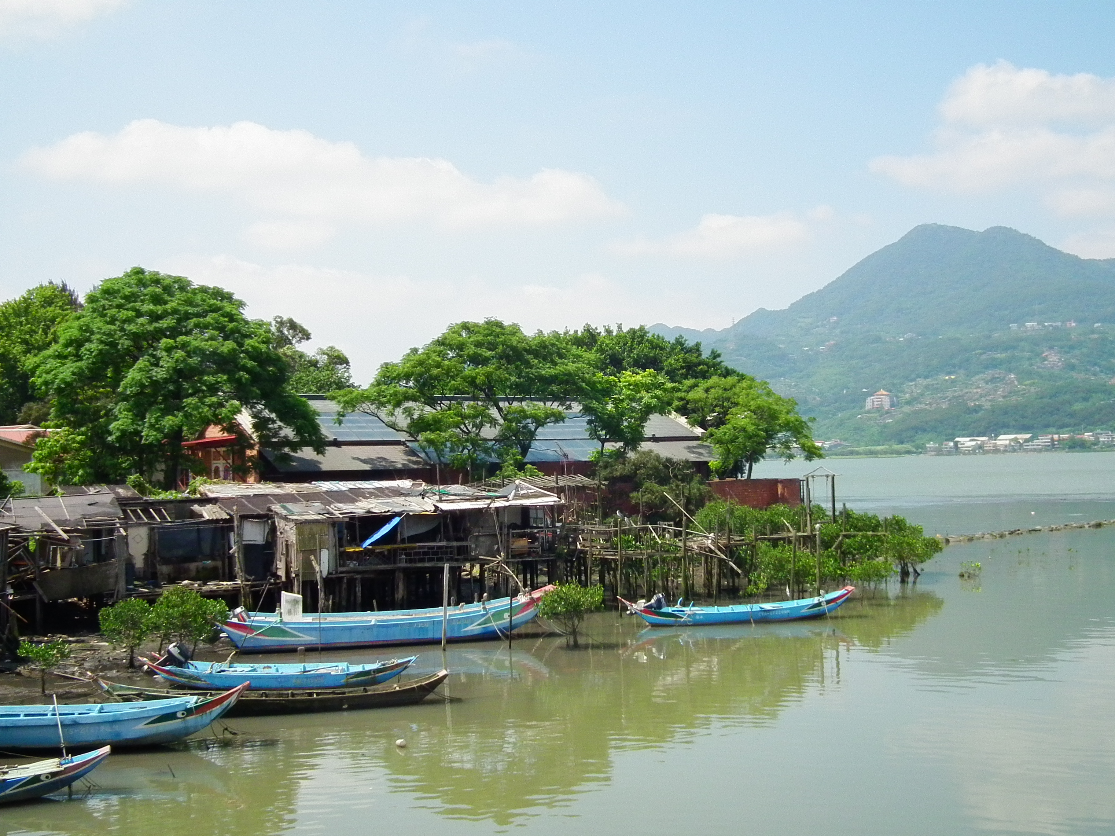 淡水河 Damsui River